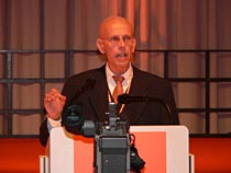 Wie bei anderen Mitgliedern des WASG-Vorstandes (Axel Troost, u. a. Thomas Händel): Bild von der Homepage der WASG. Es darf unter die GNU-Lizenz gestellt werden. "die Bilder darfst Du verwenden. (Bitte Quellenangabe nicht vergessen) Beste Grüße Björn Radke"